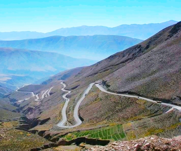 curvas en la Carretera AN 1441